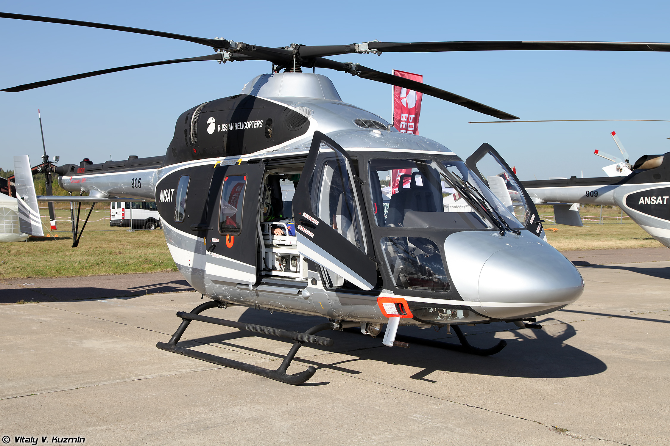 Ansat